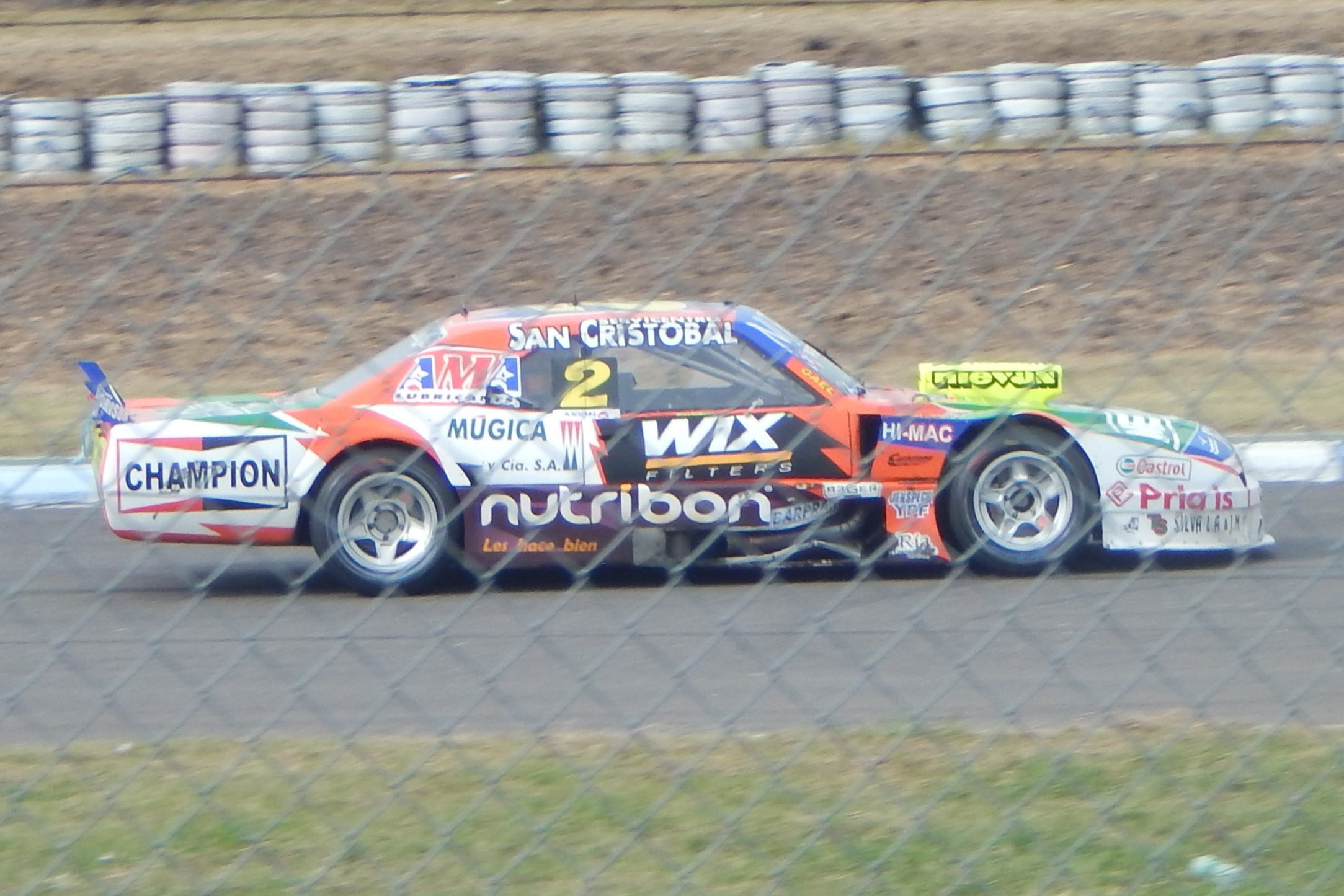 Jonatan Castellano, TC Rafaela 2019.